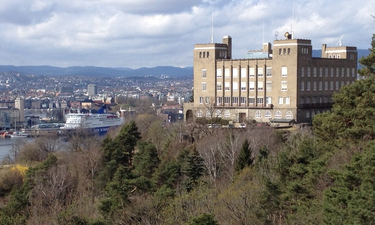 Sjømannsskolen, Oslo.